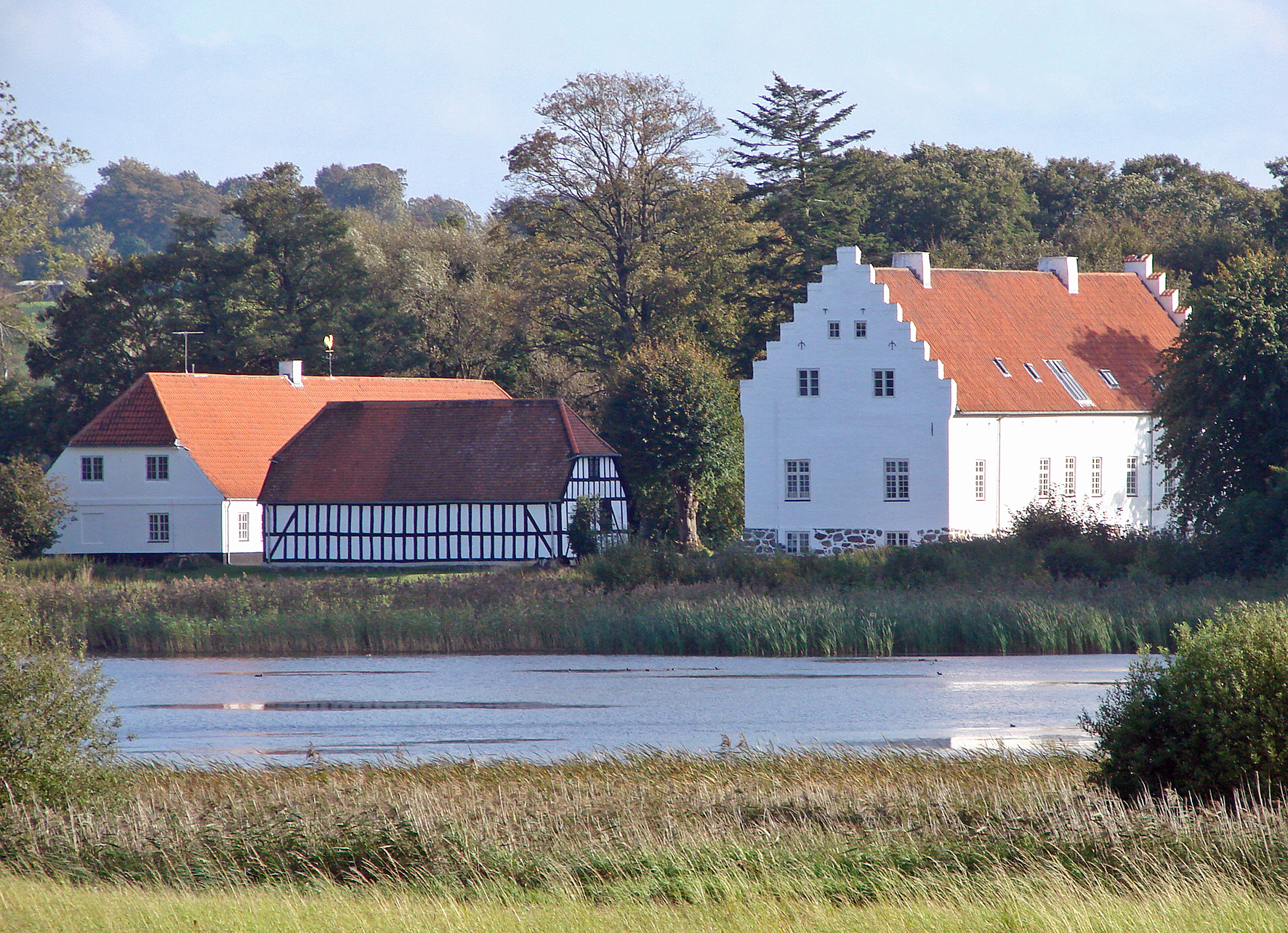 Vinderslev Holm ved Hinge Sø nordøst for Silkeborg, Jylland, Denmark